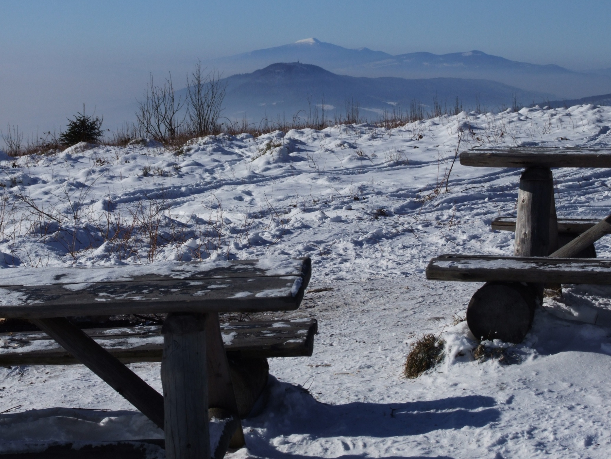 Szczyt Ćwilina. Widok na Luboń Wielki, Babią Górę i Pasmo Policy